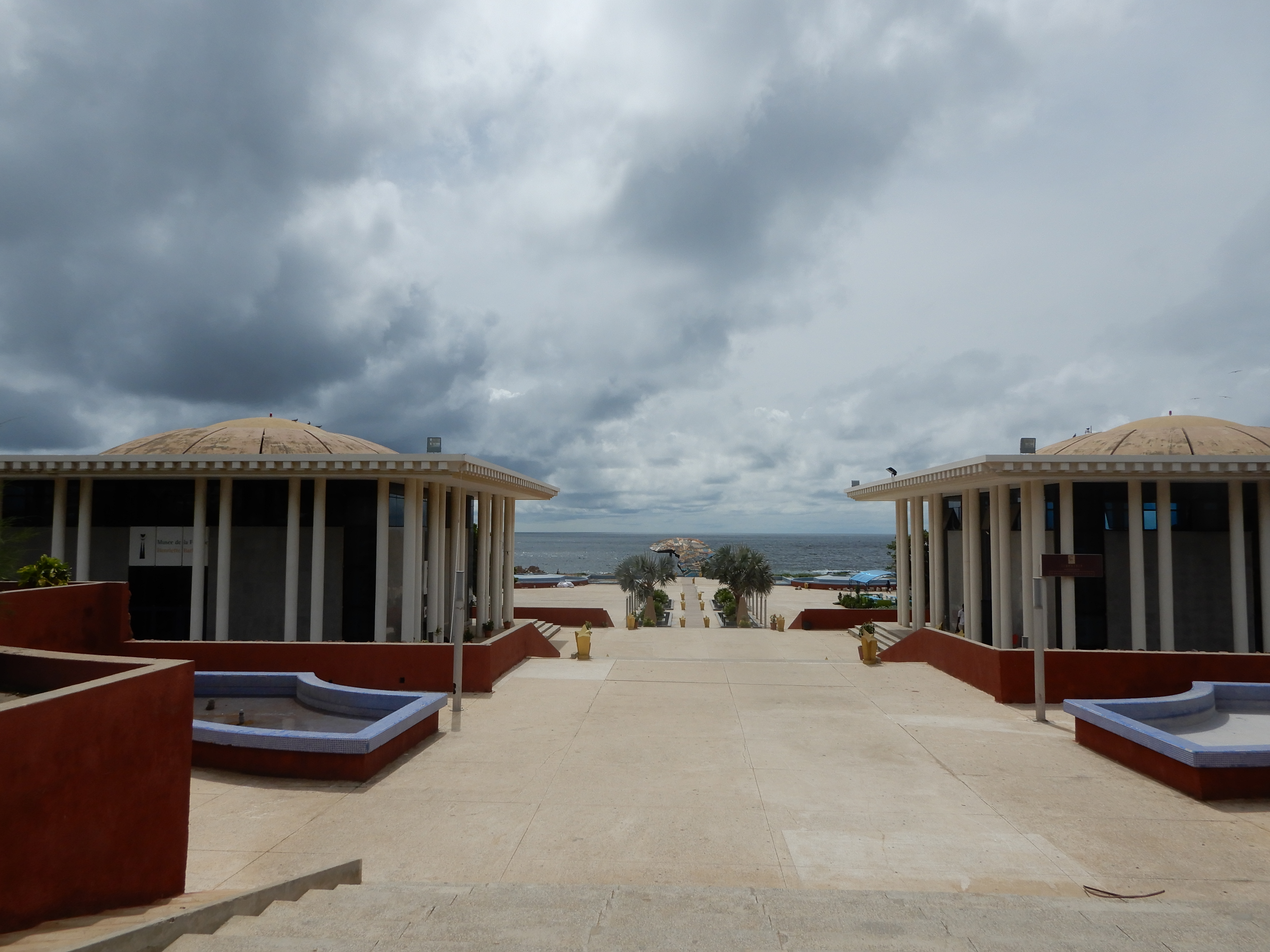 Place du Souvenir africain à Dakar. Le bâtiment de gauche abrite le musée de la femme Henriette-Bathily (photo prise en septembre 2019)